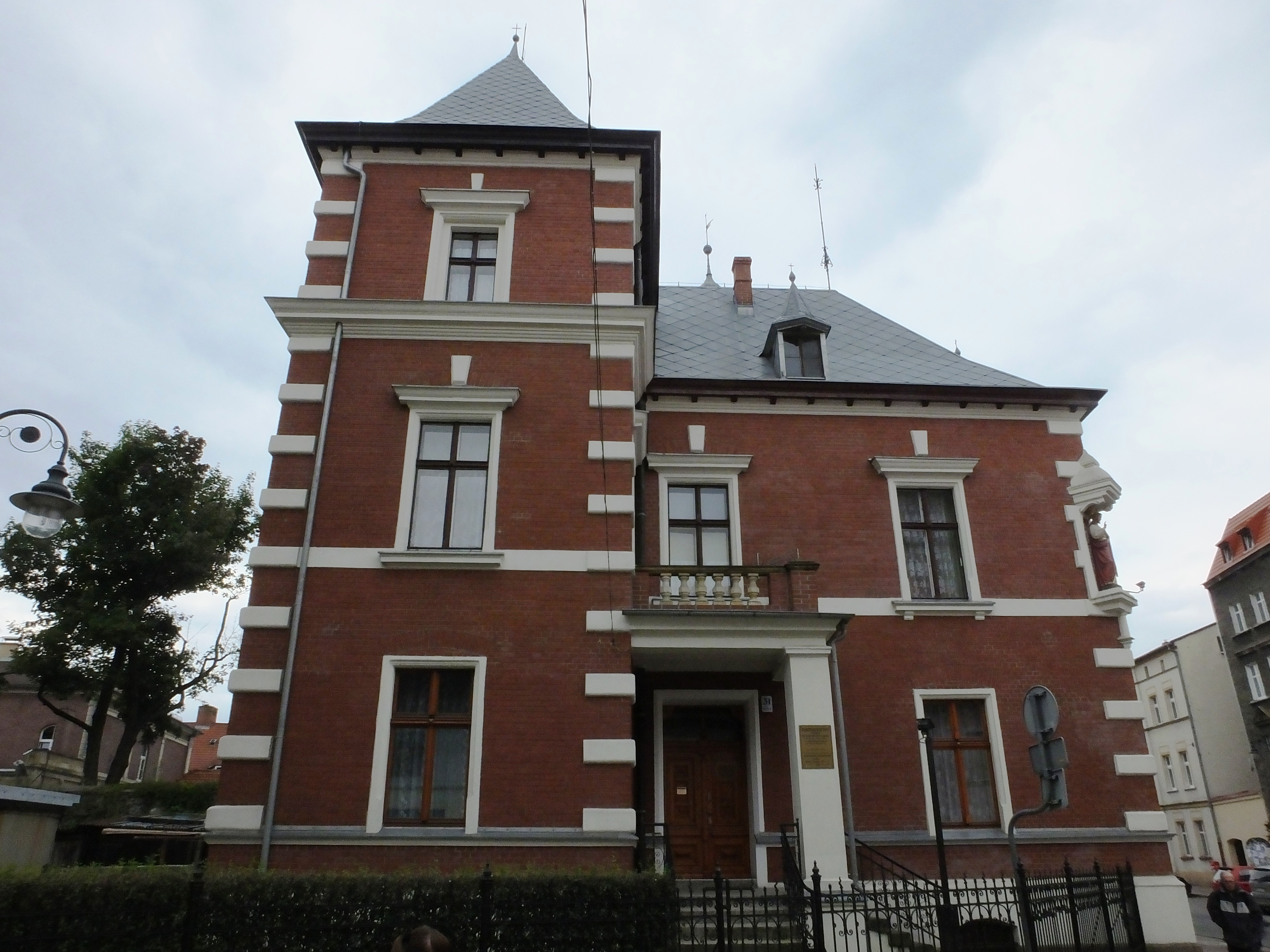 Plebania parafii Piotra i Pawła w Kamiennej Górze